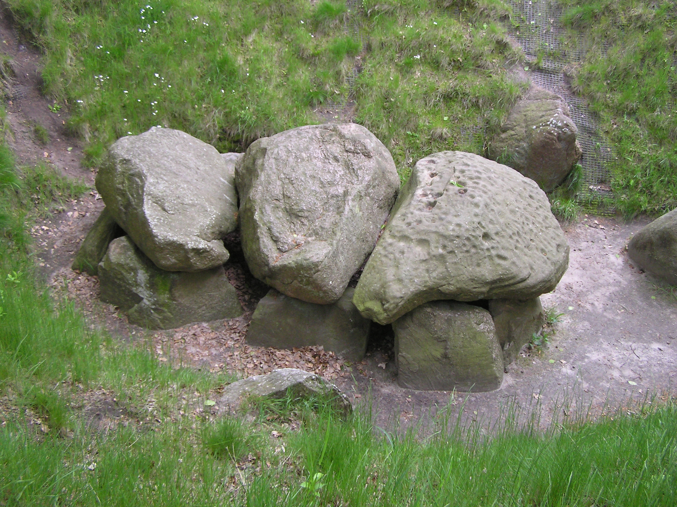 Ansicht des Großsteingrabes mit Schalenstein bei Bunsoh in Dithmarschen von Norden